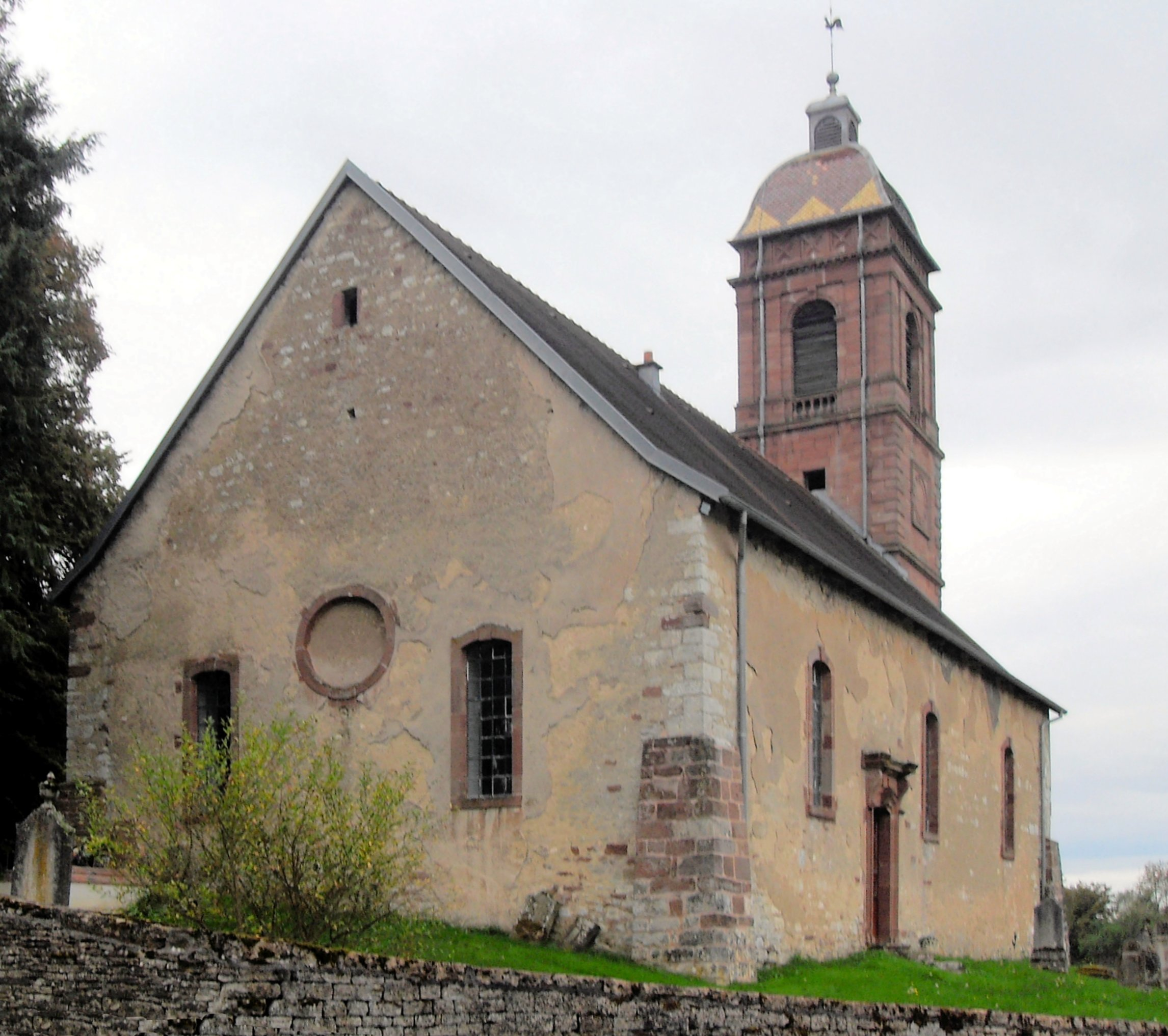 Temple protestant de Saint-Julien-lès-Montbéliard